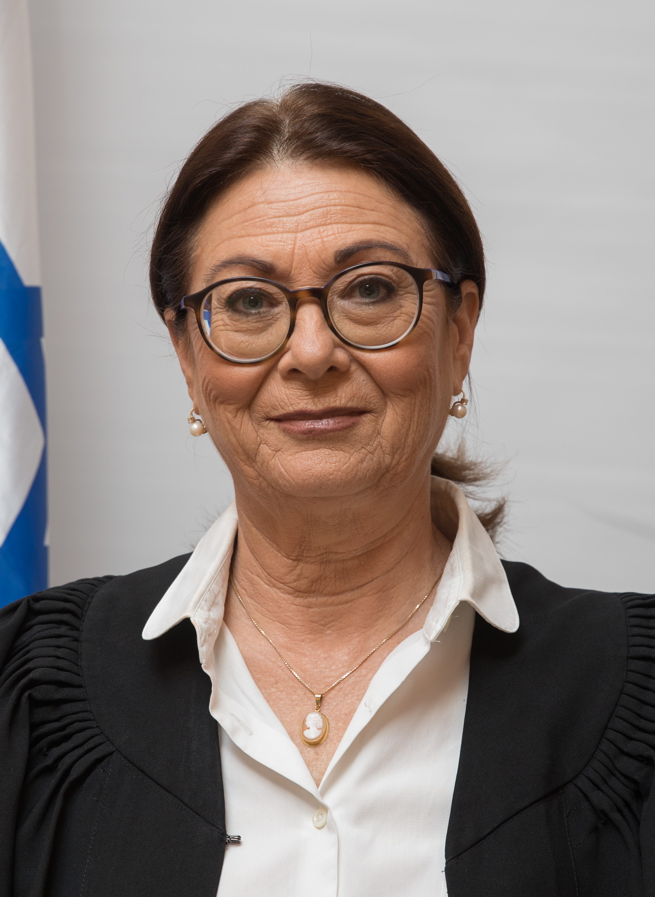 השופטת אסתר חיות, נשיאת בית המשפט העליון בישראל החל מ-26 באוקטובר 2017